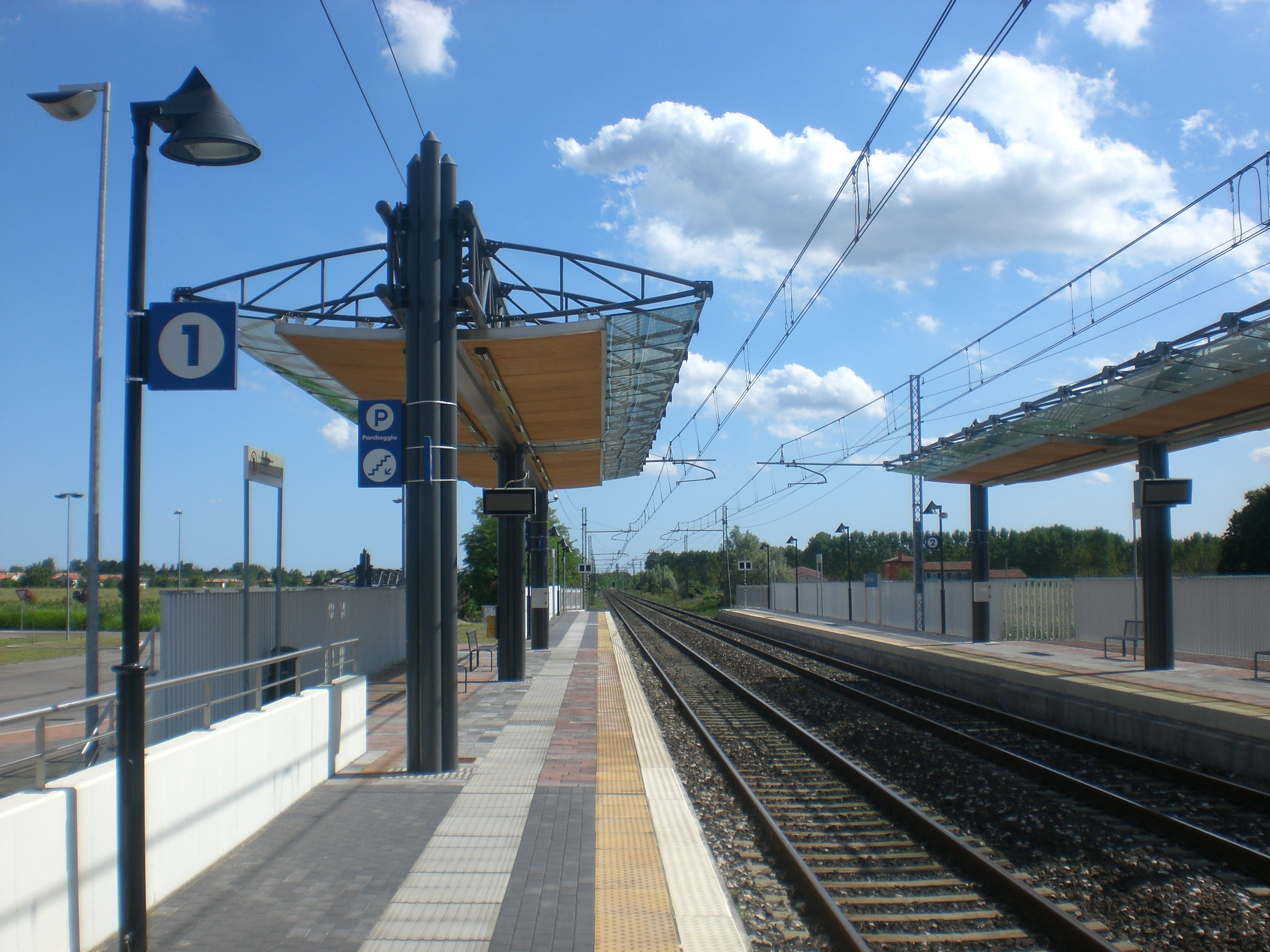 San Trovaso